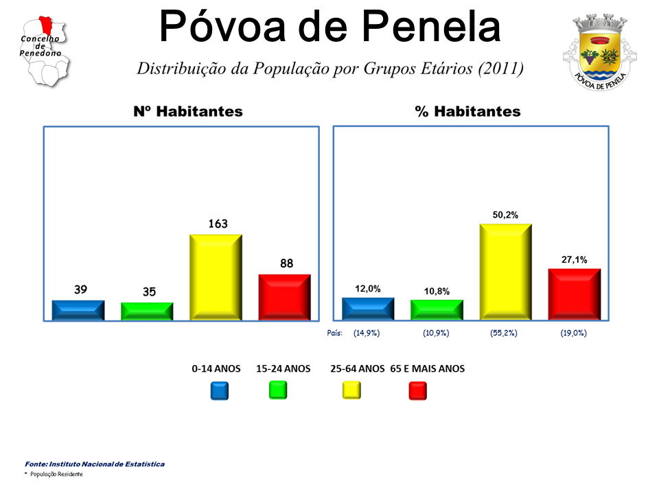 Mapa das freguesias